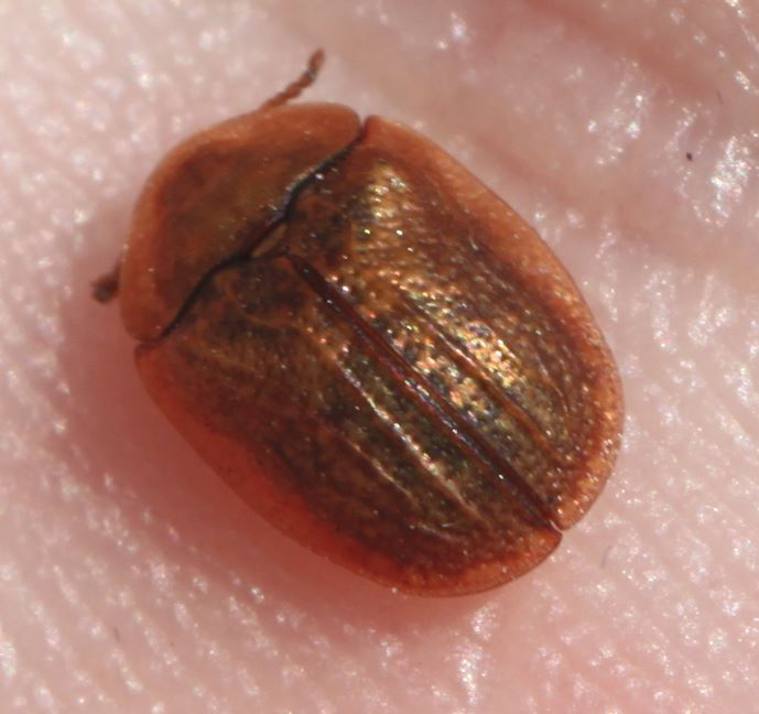 Schildkäfer Hypocassida subferrugineaam 26. Juli 2019 in Walldorf/Baden